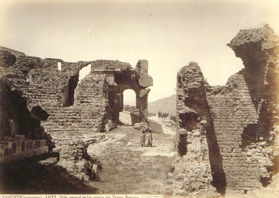 "Vista general de les ruïnes del Teatre Romà", fotografia treta per J. Laurent (1816-1886).